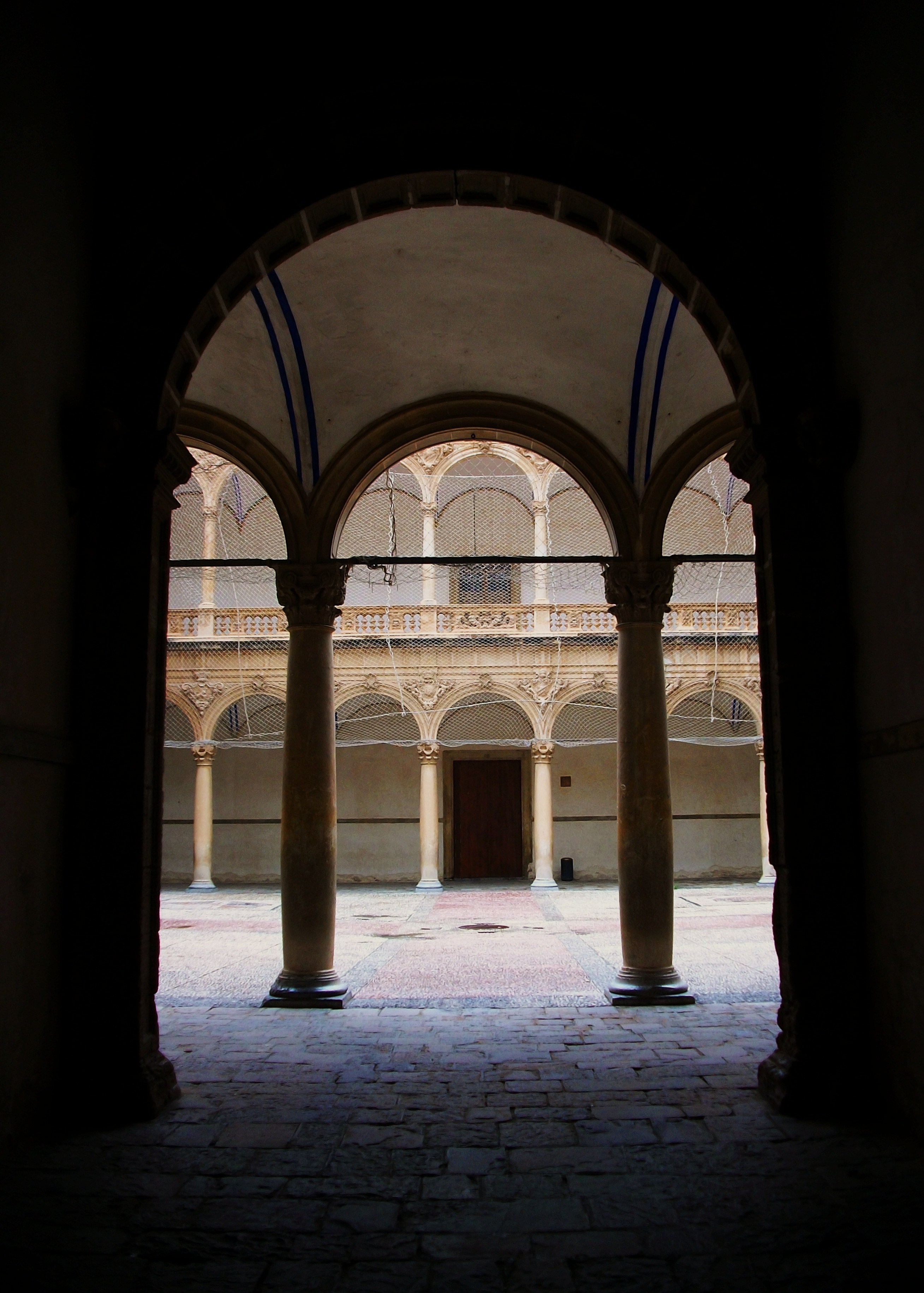 Vista del claustre de la Universitat del Col·legi de sant Domingo d'Oriola.